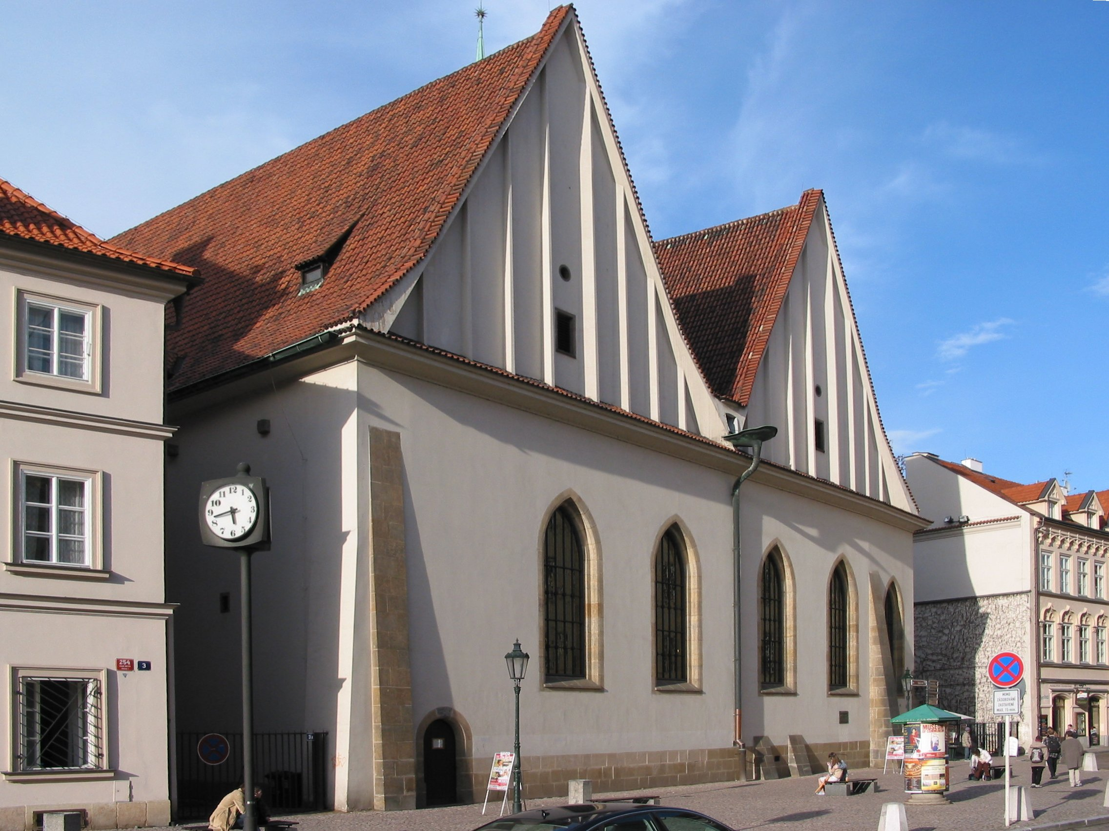 Bethlem chapel in Prague